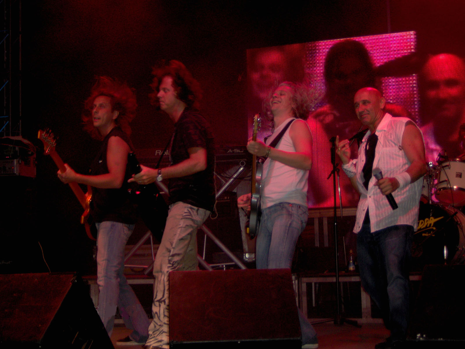 Az Edda együttes 2007-ben, Békéscsabán